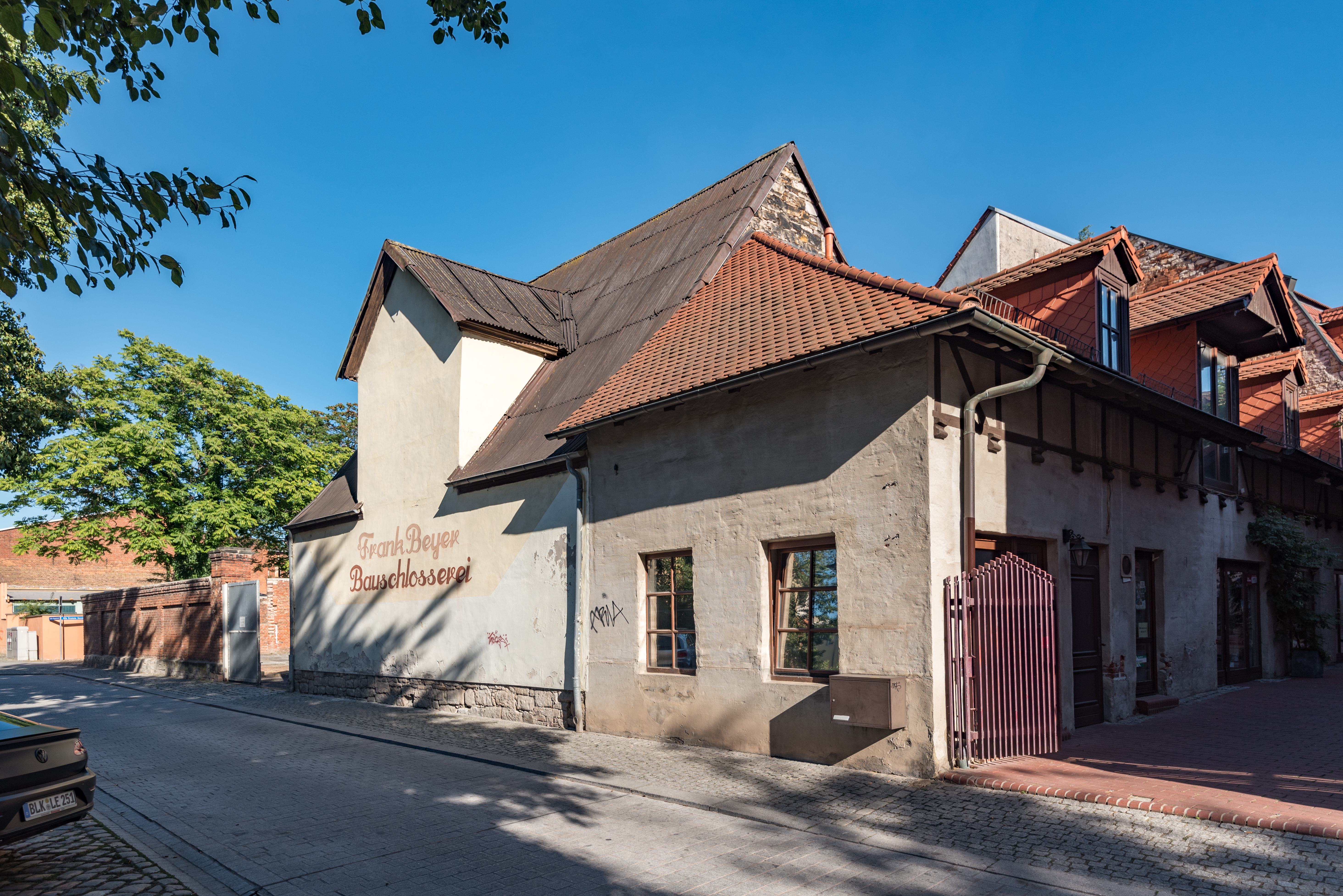 Weißenfels, Große Kalandstraße 26